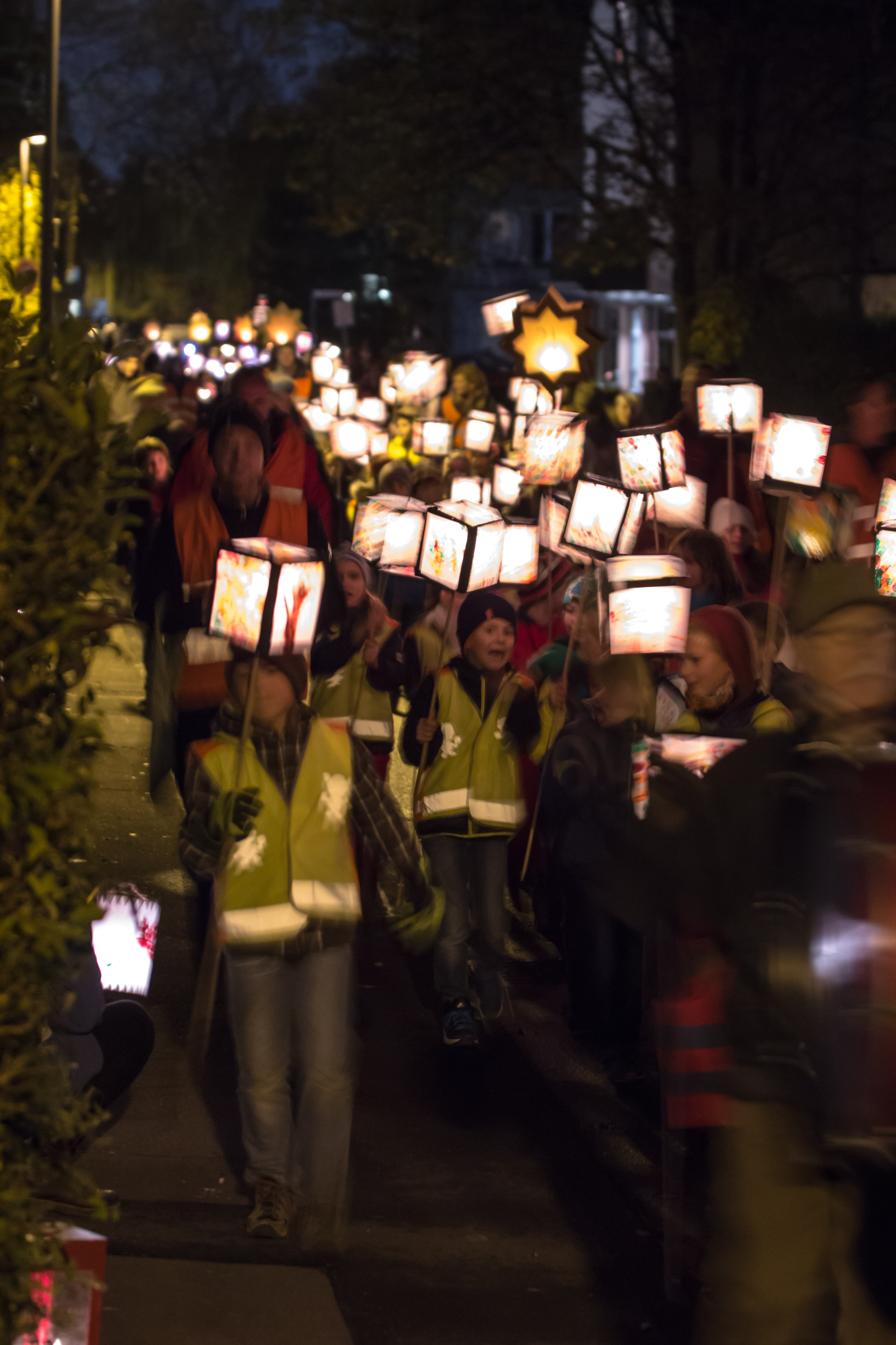 Martinsumzug in Köln